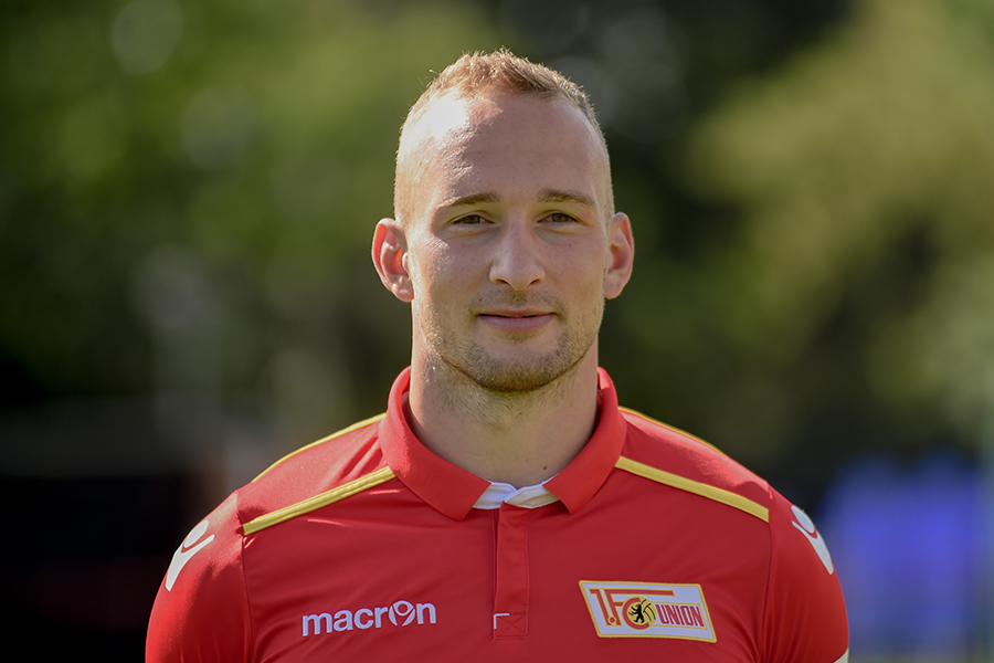 Toni Leistner, Fußballer, 1. FC Union Berlin (2016)